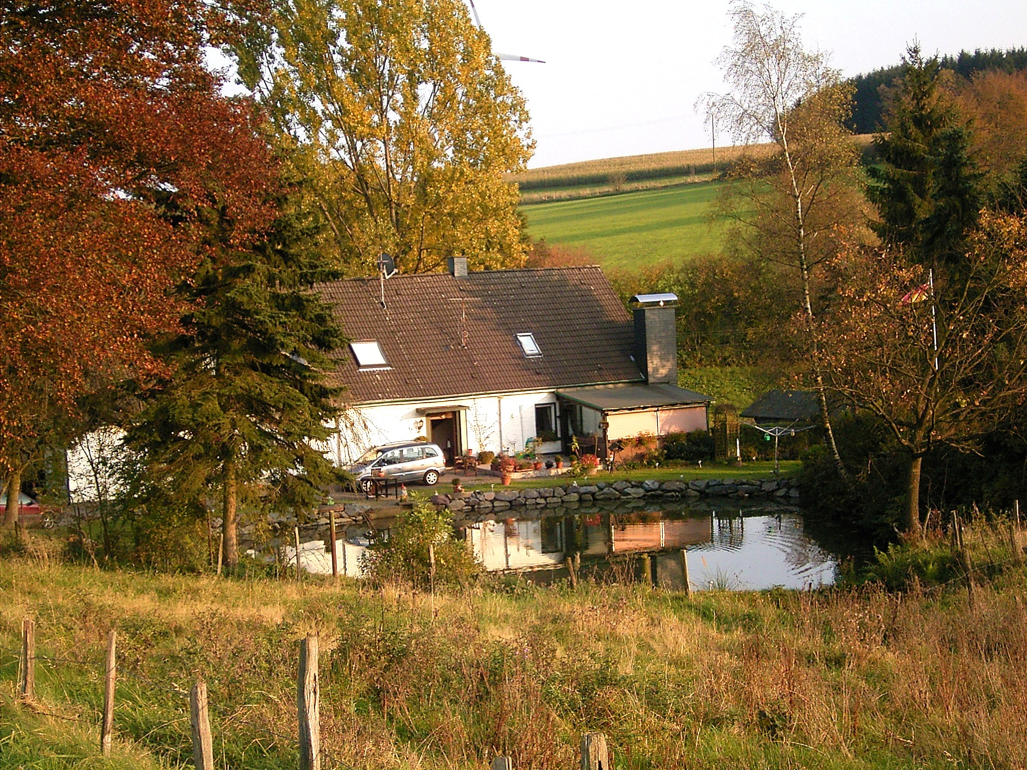 Radevormwald